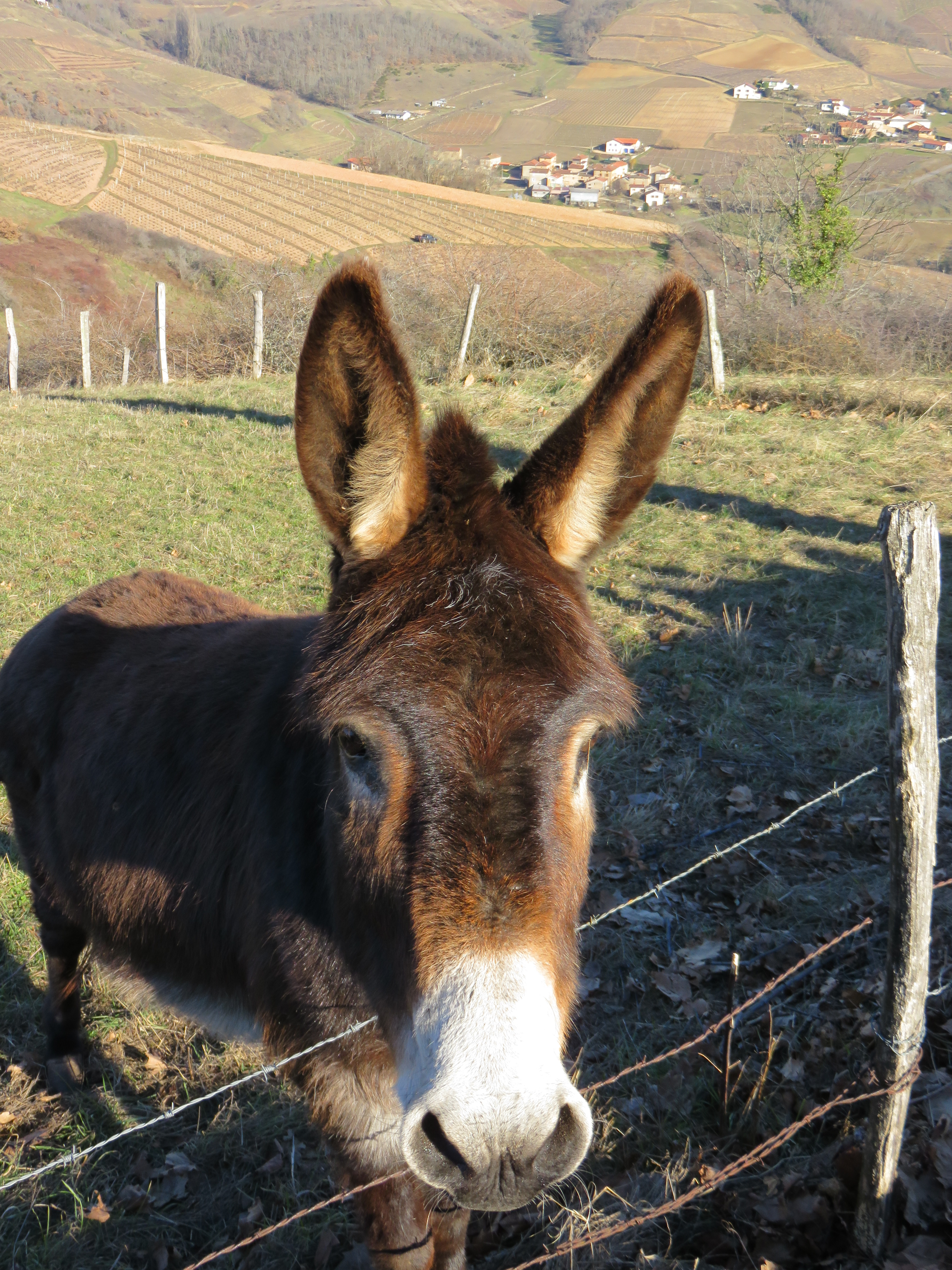 Un âne, à Sainte-Paule (Rhône, France).